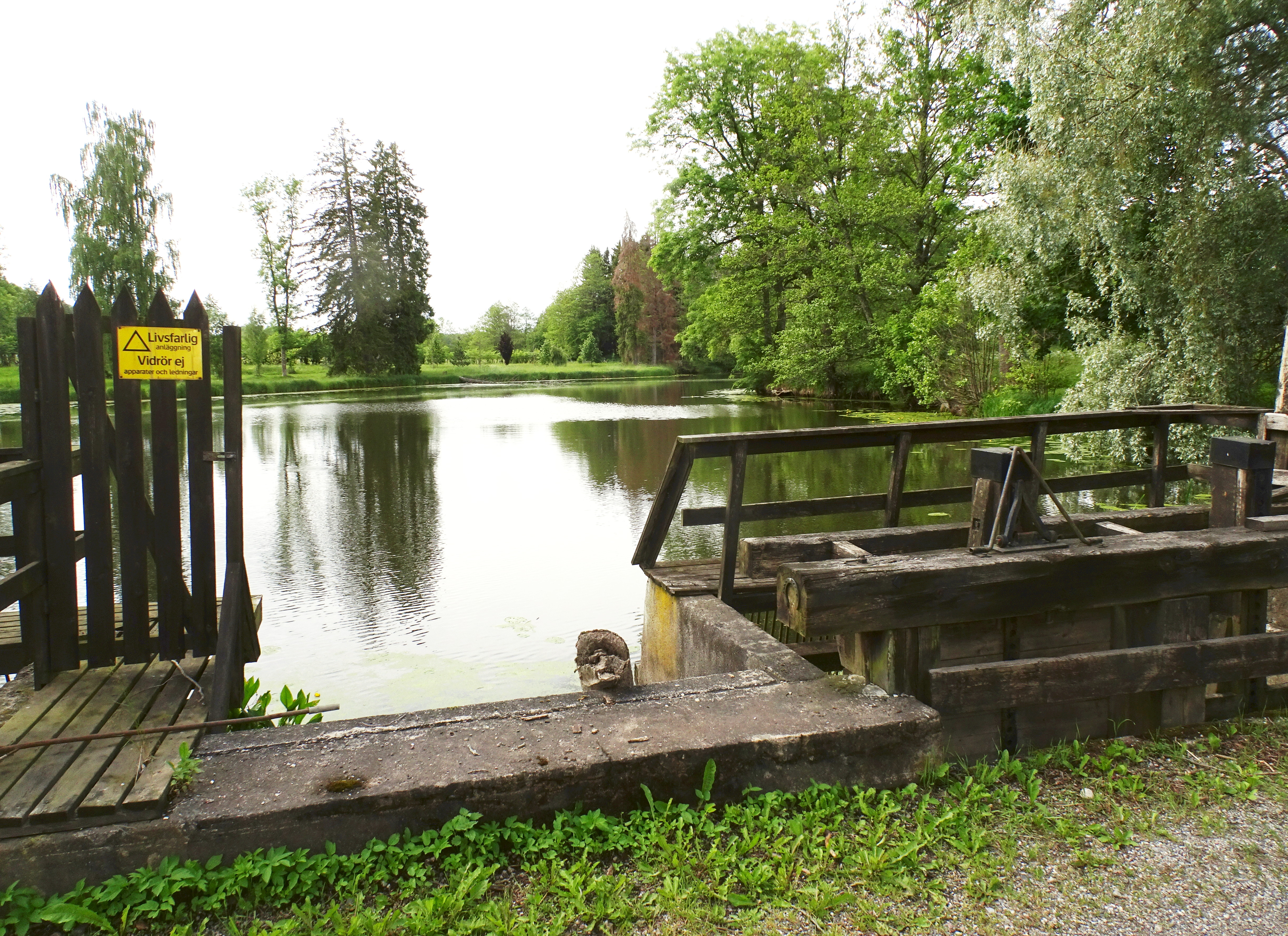 Bränninge gård, dammen